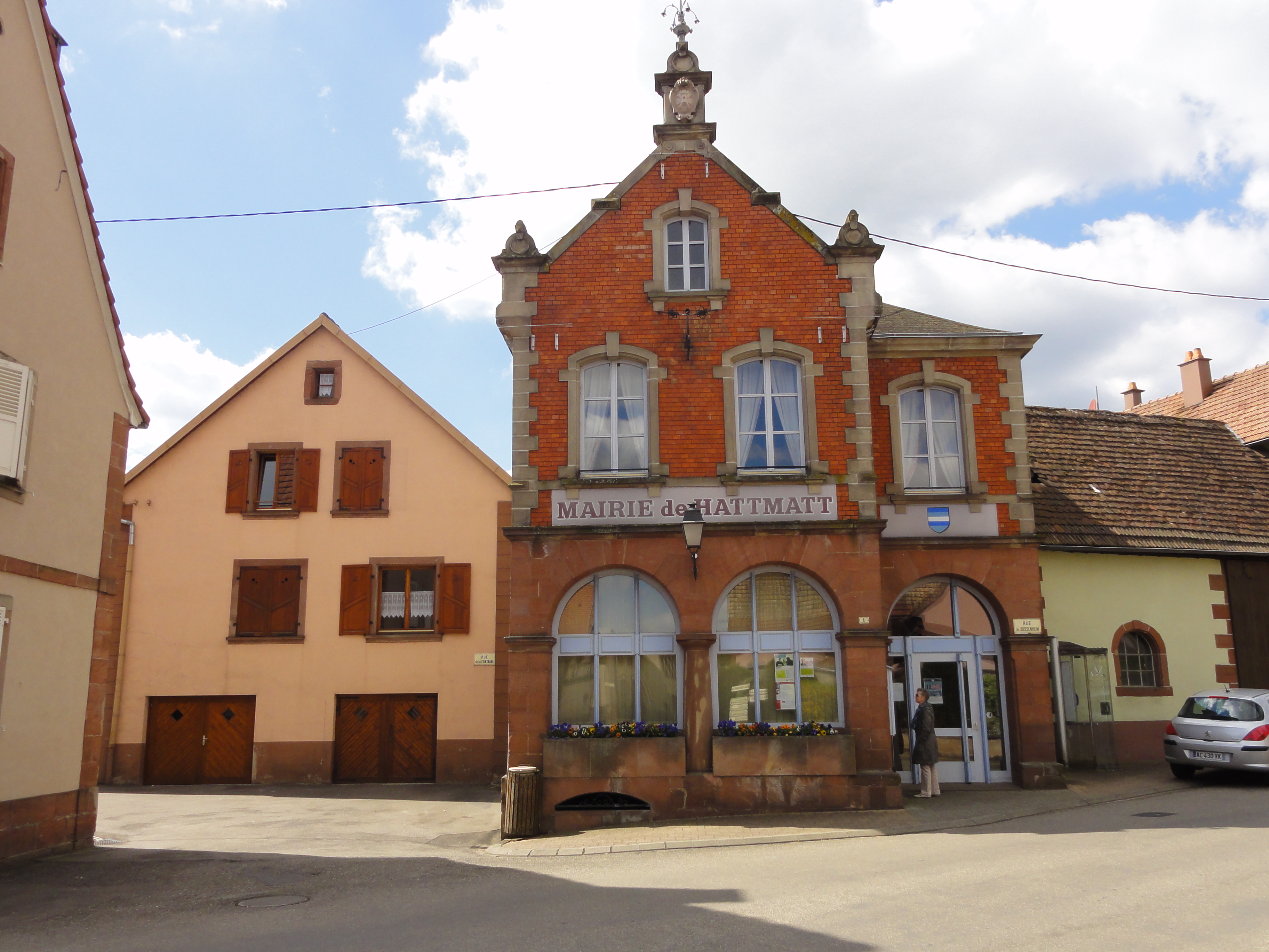 Alsace, Bas-Rhin, Hattmatt, Mairie.